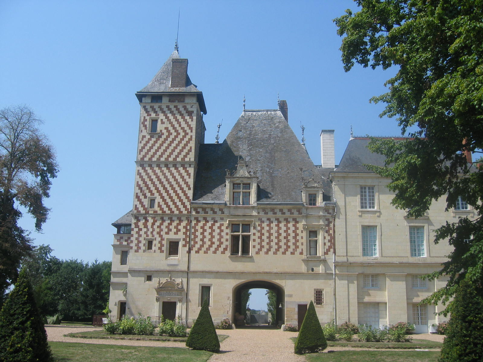 Torhaus des Schlosses Les Réaux